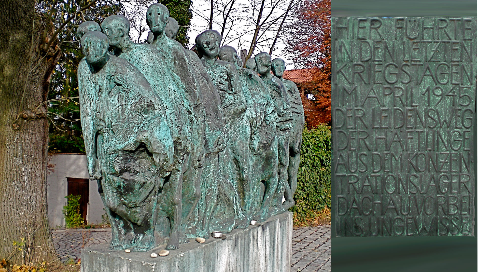 Das Mahnmal steht in Krailling, Gautinger Straße, neben dem Fluß Würm. Die Aufnahme machte ich bei meinem Erinnerungsbesuch am 24.11.2006. Mein Bruder Godehard und ich sind am 27.4.1945 auf dem Weg nach Gauting dem "Todesmarsch" etwa an dieser Stelle begegnet. Unser Vater schrieb damals nach unserem Bericht in sein Tagebuch: "Ein grausiges Geschehen, das zu schildern nicht möglich ist." Inschrift der Tafel: HIER FÜHRTE IN DEN LETZTEN KRIEGSTAGEN IM APRIL 1945 DER LEIDENSWEG DER HÄFTLINGE AUS DEM KONZENTRATIONSLAGER DACHAU VORBEI INS UNGEWISSE